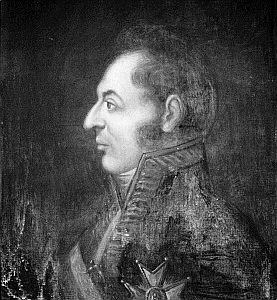 Retrato de don Pedro Ceballos Guerra